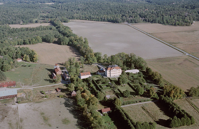 Tureholms slott (även stavat Thureholms slott). Bilden är tagen mot (väderstreck): NNO Motiv: Tureholm Nyckelord: Flygbilder, Riksintressen Kategori: Herrgårds-/slottslandskap Tureholms slott (även stavat Thureholms slott). Bilden är tagen mot (väderstreck): NNO.